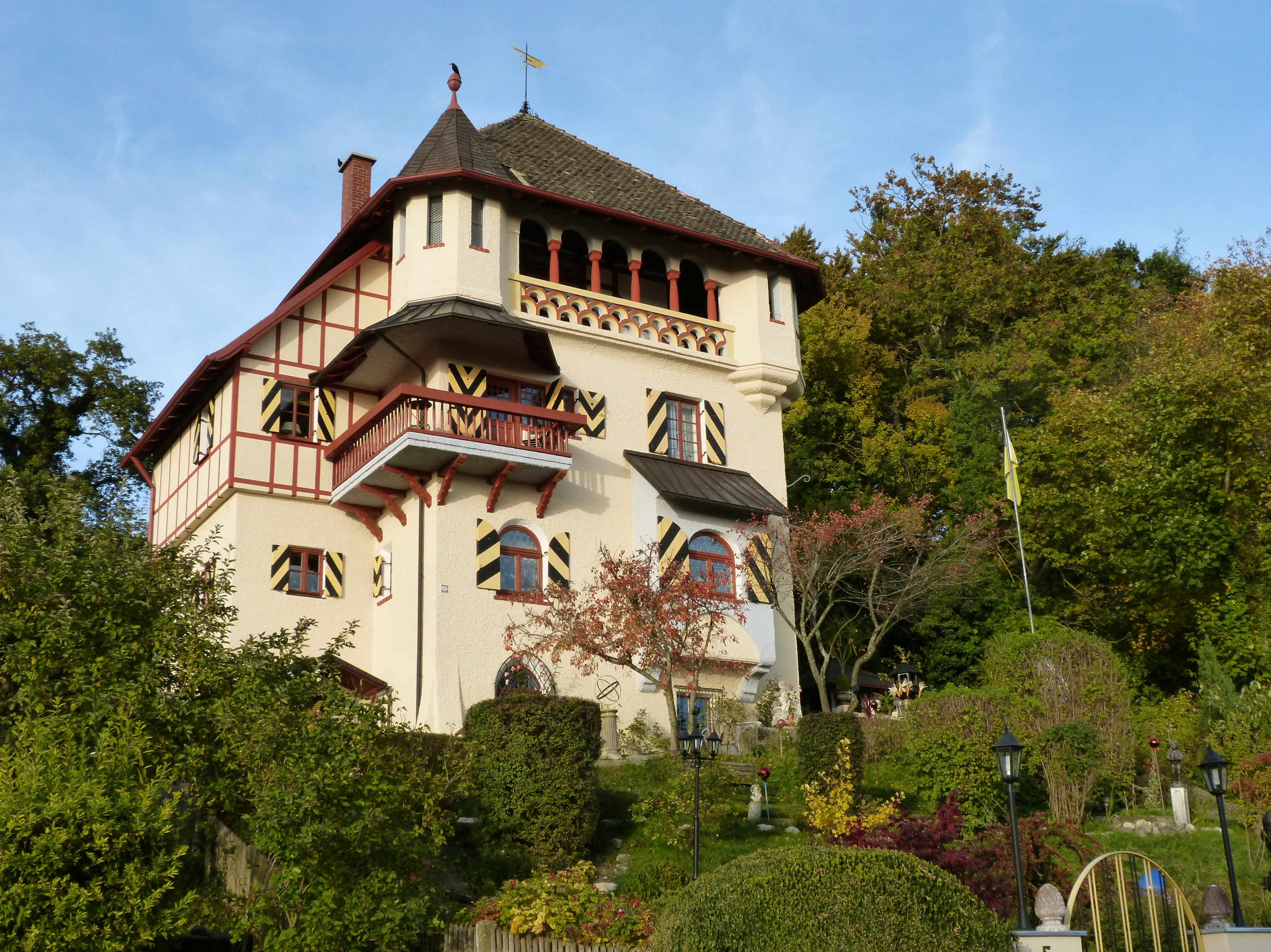 Wörthsee, OT Walchstadt, Villa Kraus. Die burgartige Villa mit Walmdach, Erkern, Balkons und Loggia wurde 1901 unter der Leitung des Ingenieurs Max Kraus (München) erbaut.